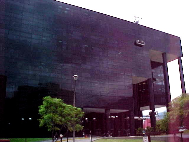 Cubo Negro en municipio Chacao, estado Miranda – Venezuela (2000)